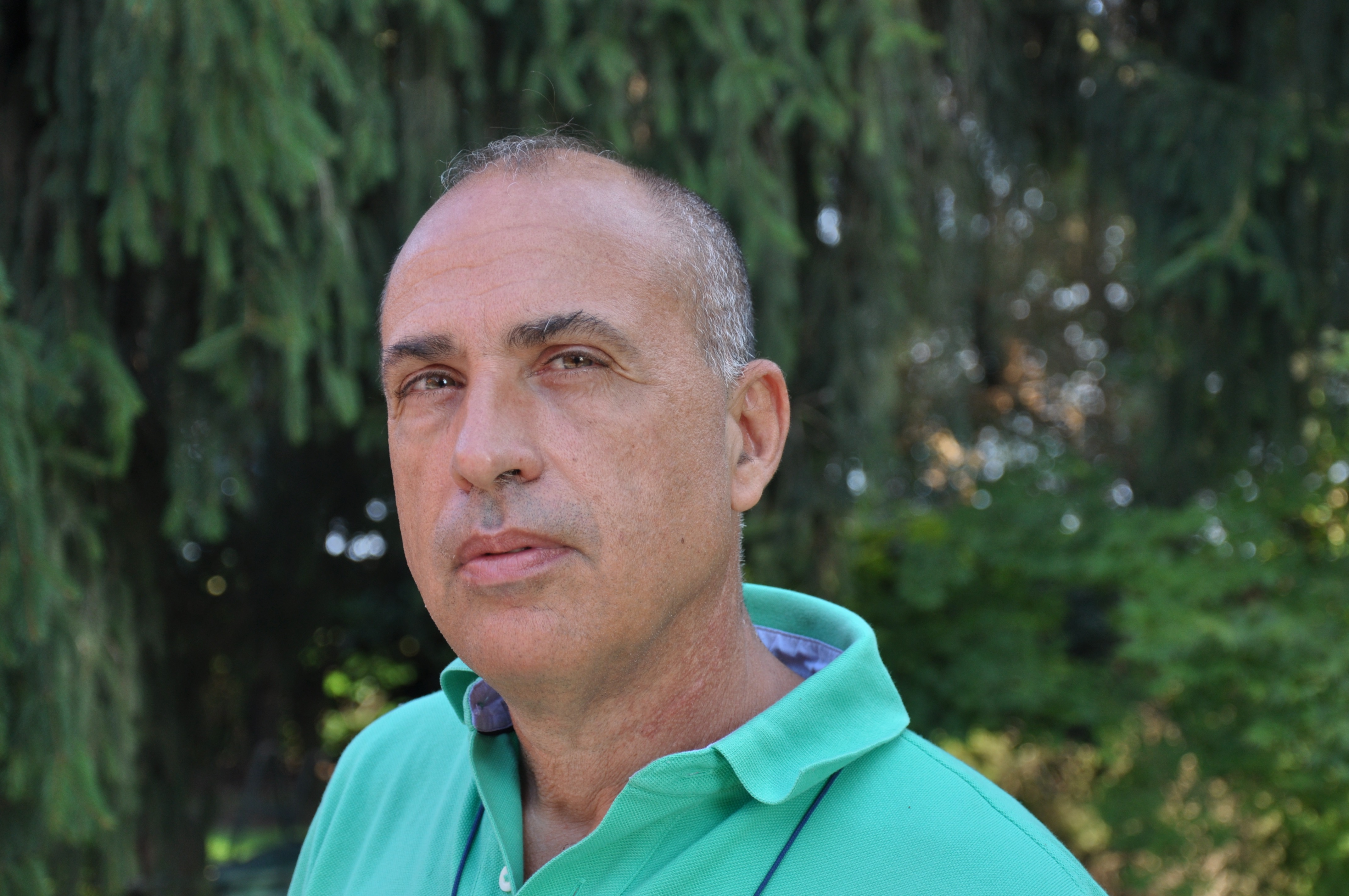 Roberto Marchesini